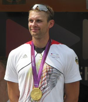 Filip Adamski beim Empfang der Olympia-Teilnehmer des Teams London der Metropolregion Rhein-Neckar 2012.